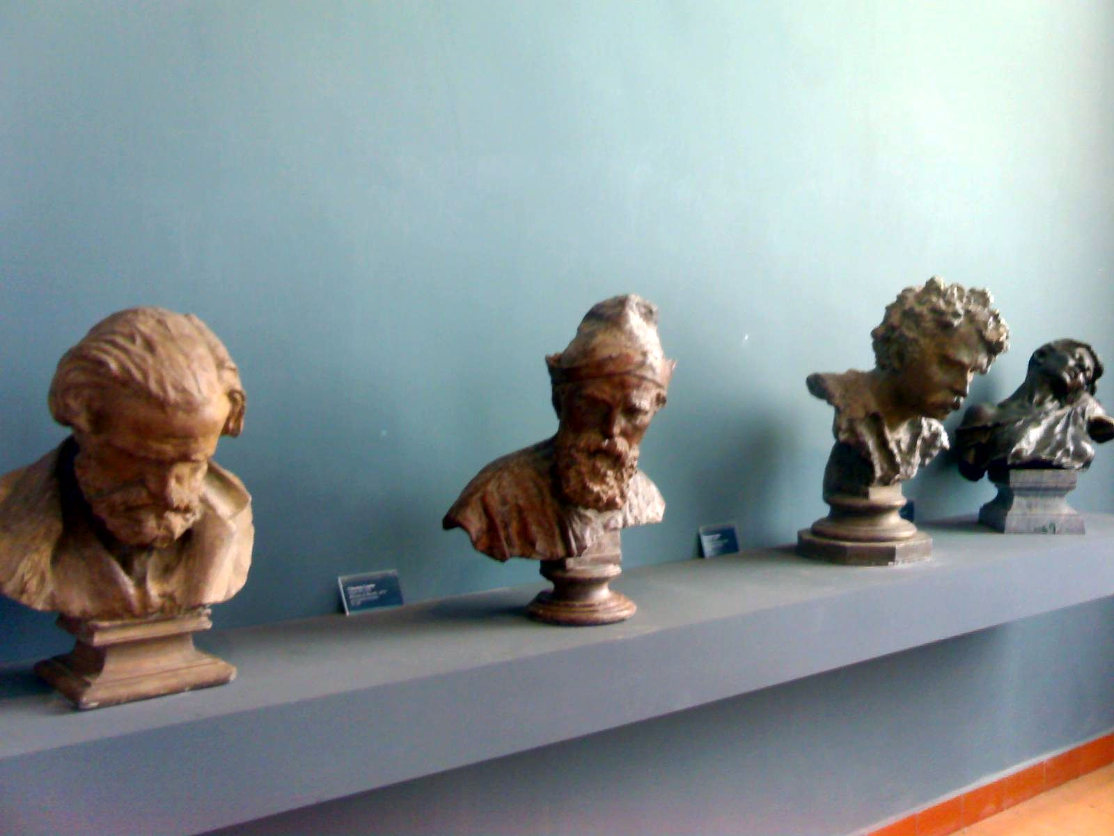 Accademia di Belle Arti di Napoli - La galleria dell'accademia. Particolare di 4 sculture di Vincenzo Gemito. In ordine Giuseppe Verdi (terracotta 1874), Domenico Morelli (terracotta 1874), Marià Fortuny i Marsal (terracotta 1874), Ritratto di donna (bronzo 1897).